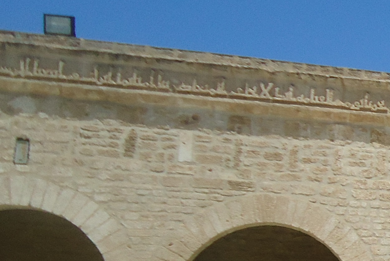 Тунис. Сүс ҡалаһындағы Бөйөк мәсеттәге боронғо яҙмалар